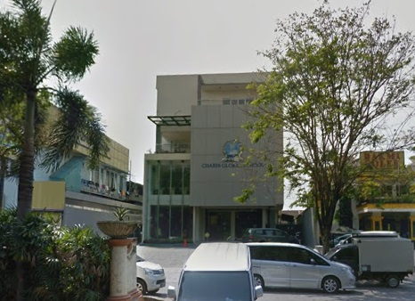 インドネシアにあるインターナショナル学校